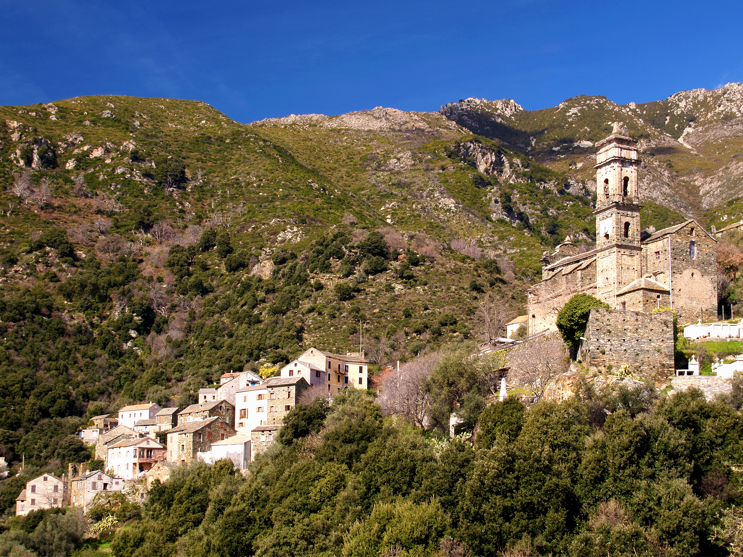 Volpajola - Le village